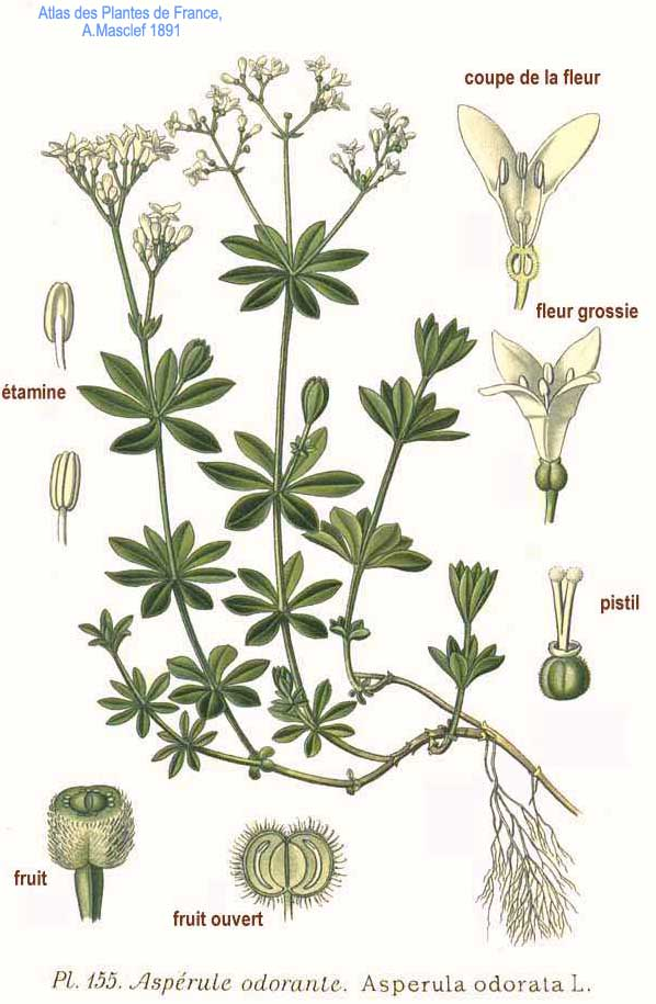 Asperula odorata L.